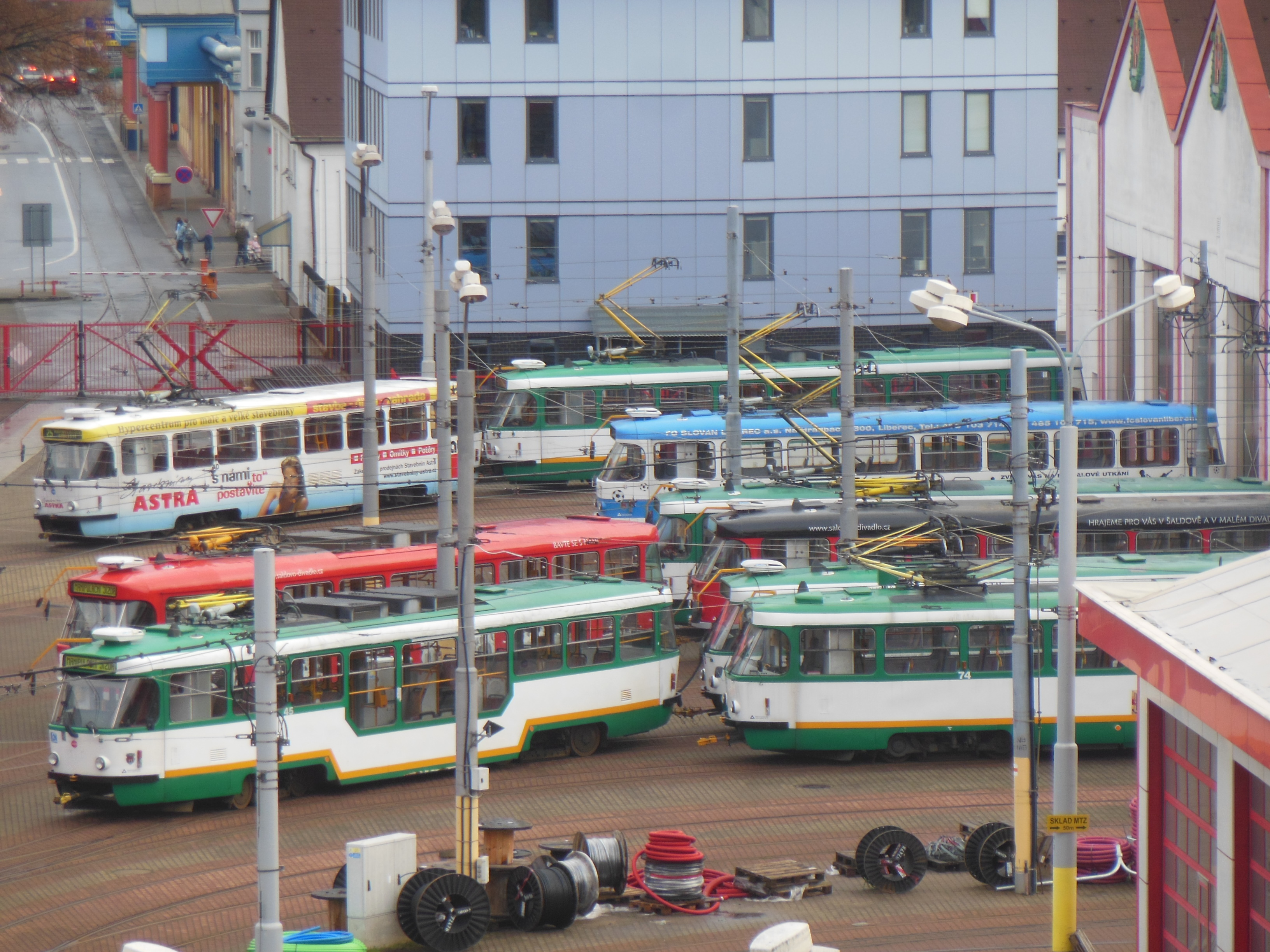 Liberec (okres Liberec). Ulice Mrštíkova, vozovna DPMLJ, pohled z ulice 1. máje.